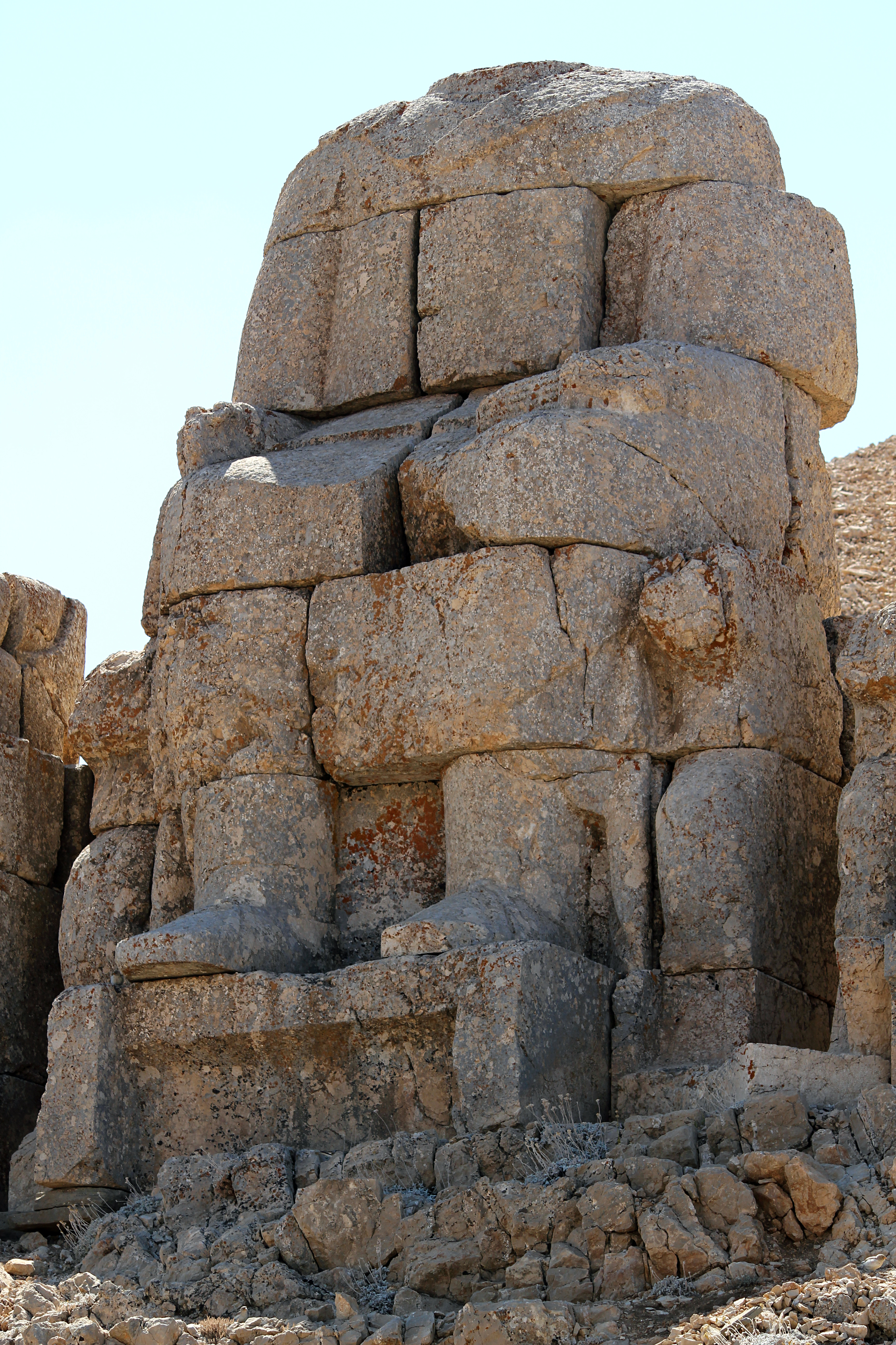 Thron der Monumentalstatue des Zeus, Nemrut Dağı, Südosttürkei, Ostterrasse